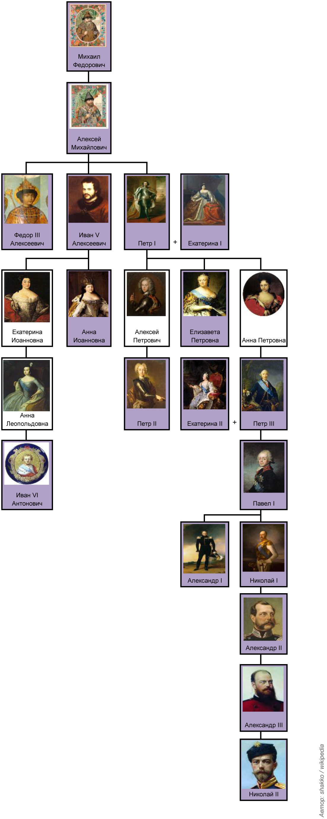 Генеалогическое древо дома Романовых